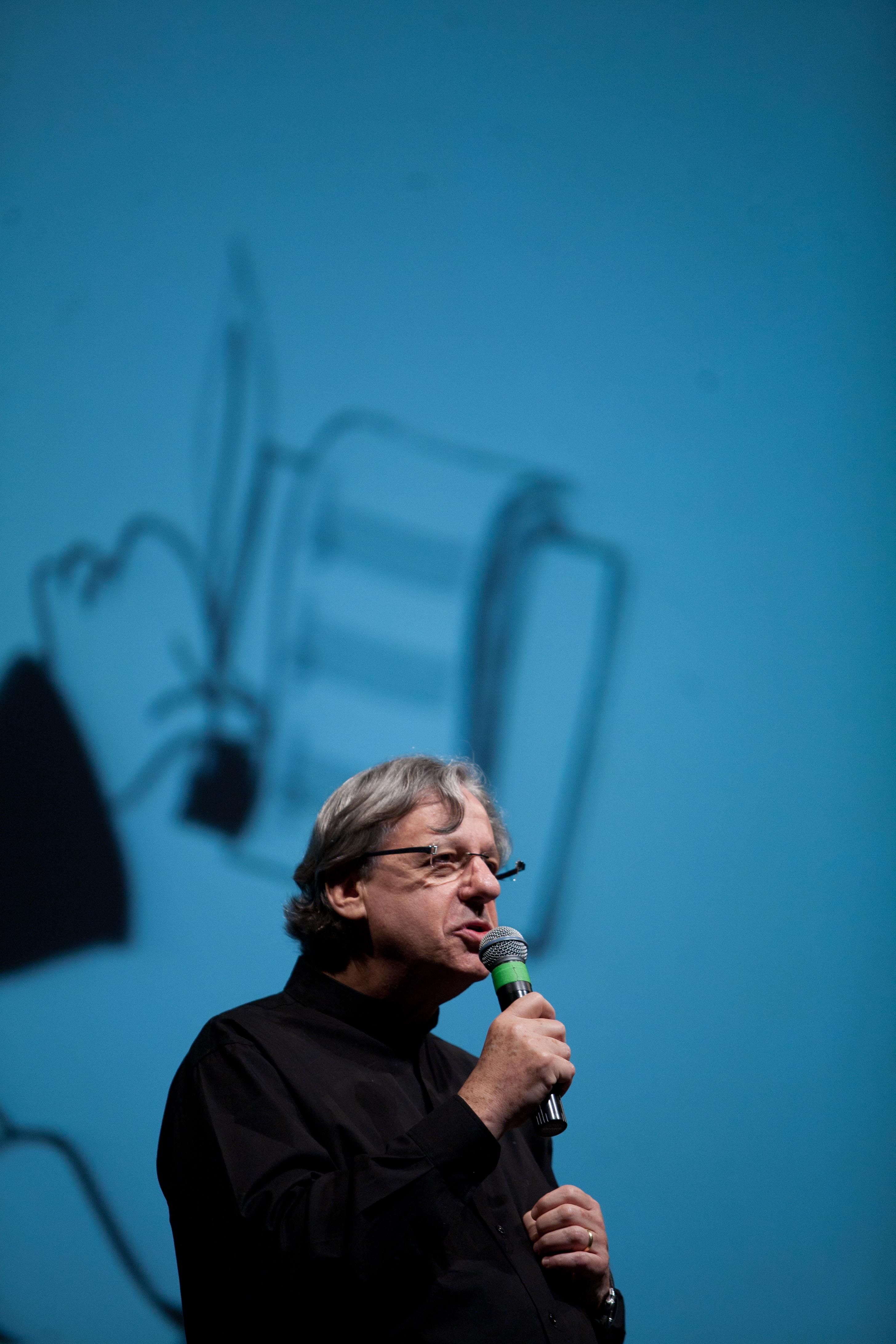 Maestro John Neschling na apresentação da Companhia Brasileira de Ópera, no Palácio das Artes em Belo Horizonte. Foto: Pedro França/MinC